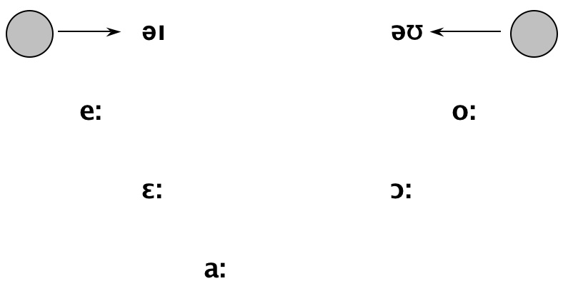 元音大推移-拉变链-第一阶段示意图